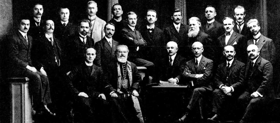 Etnografska sekcija jugoslovanske delegacije na mirovnih pogajanjih v Parzu 1919/1920. Spredaj sedijo od leve proti desni: Ehrlich, Zriemsky, Cvijič (predsednik sekcije), L. Vojnovič, Radonič in Signjar; zadaj so pa; Šorli, Djordjevič, Šišič, Kovačič, Stanojevié, Tresič-Pavičič, Ribarič, B. Rajié, Cok, Radojčič, Belič, Mihalčie, Slavič, Zupanič, Mačkovšek m Lenac.